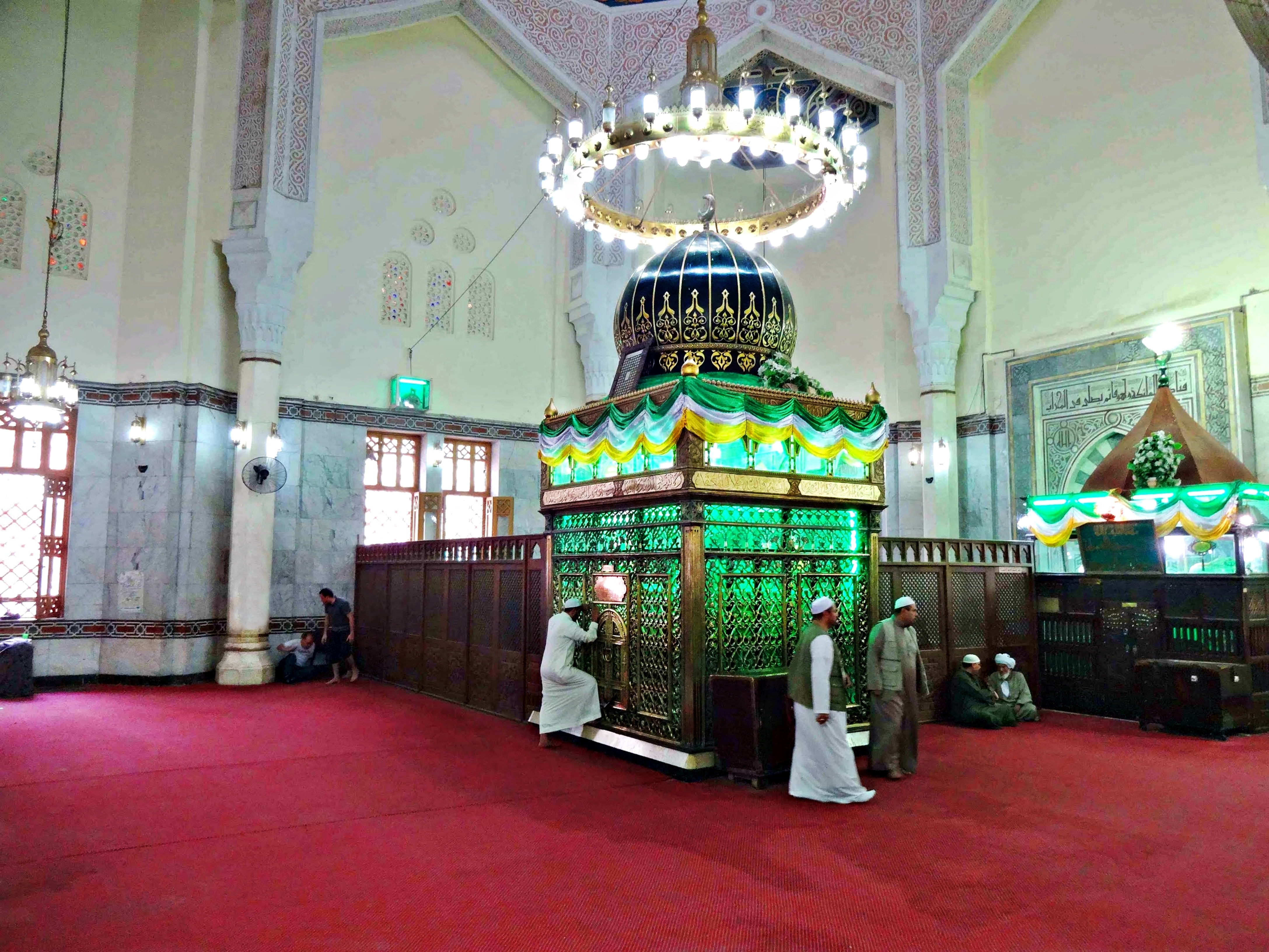 ضريح الإمام إبراهيم الدسوقي وضريح شقيقه. دسوق، مصر